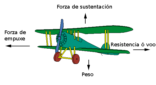 Breve esquema das forzas que aparecen no voo dun avión.